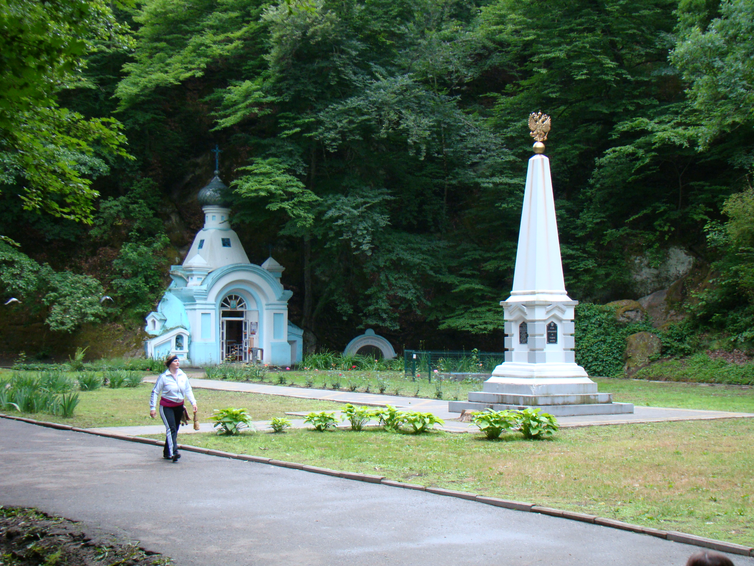 Иверская часовня (вторая половина XIX века) и памятник основателям курорта. Город Горячий Ключ, Краснодарский край, Россия